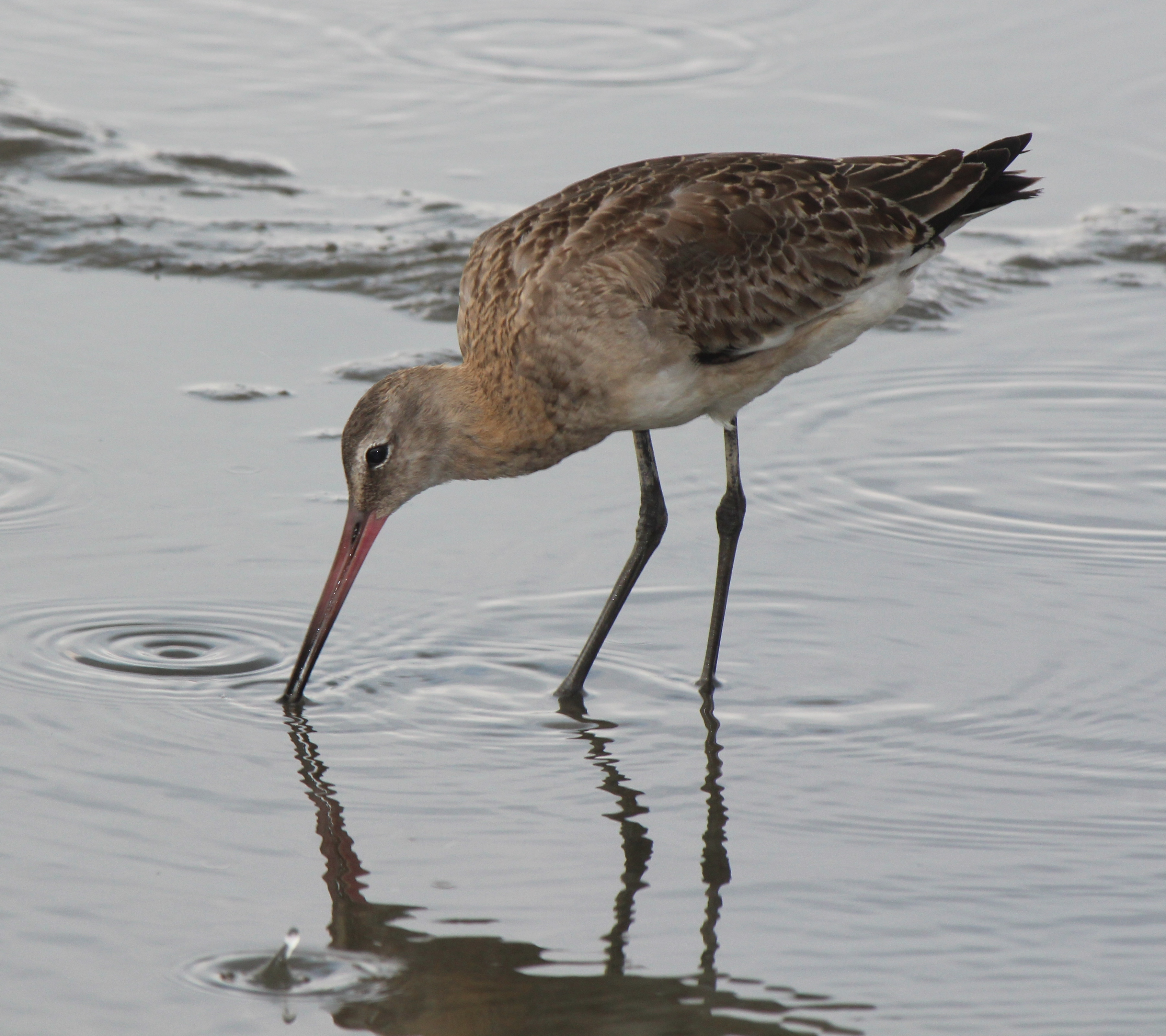 オグロシギ、庄内川河口にて